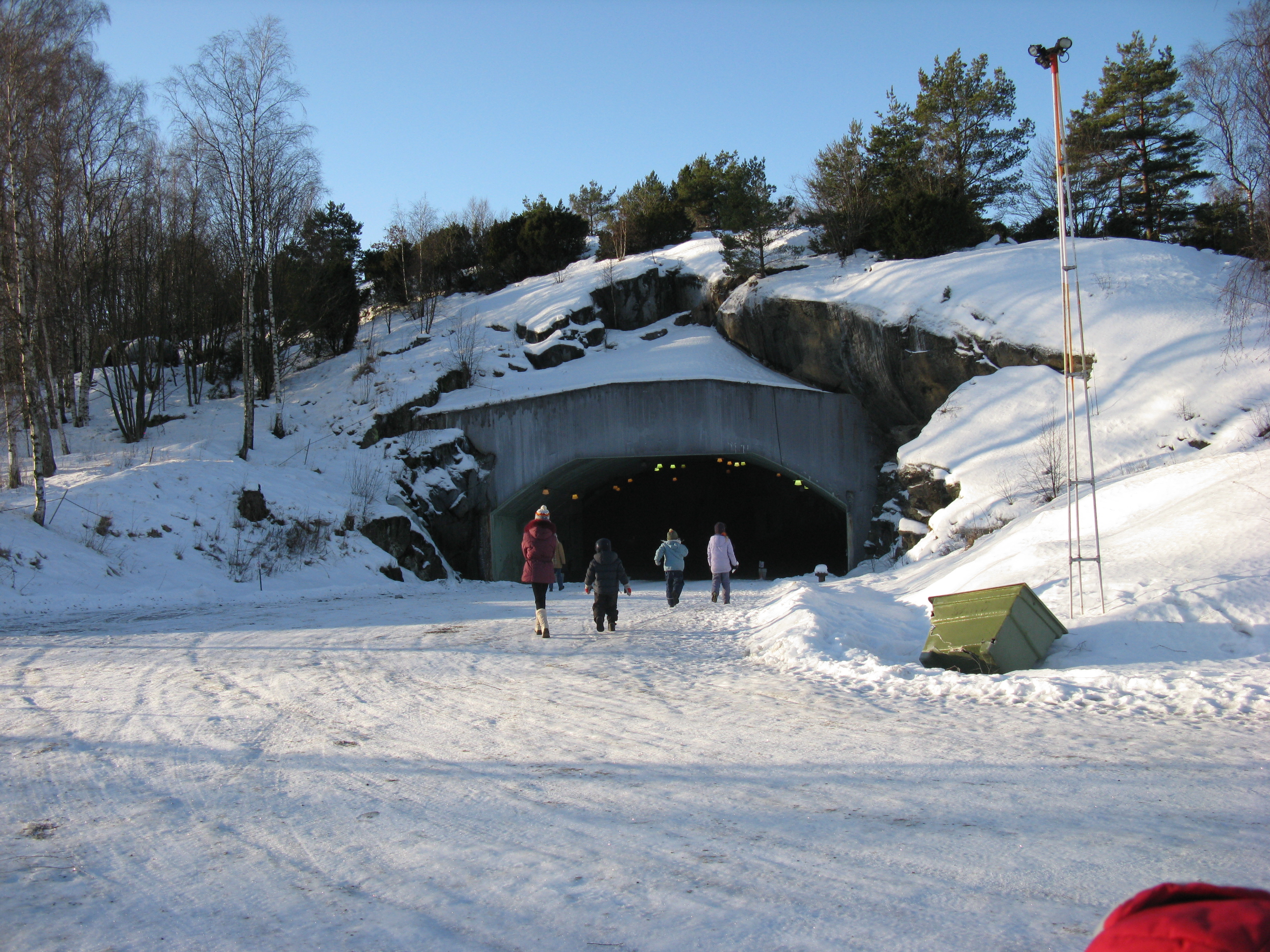 Aeroseum